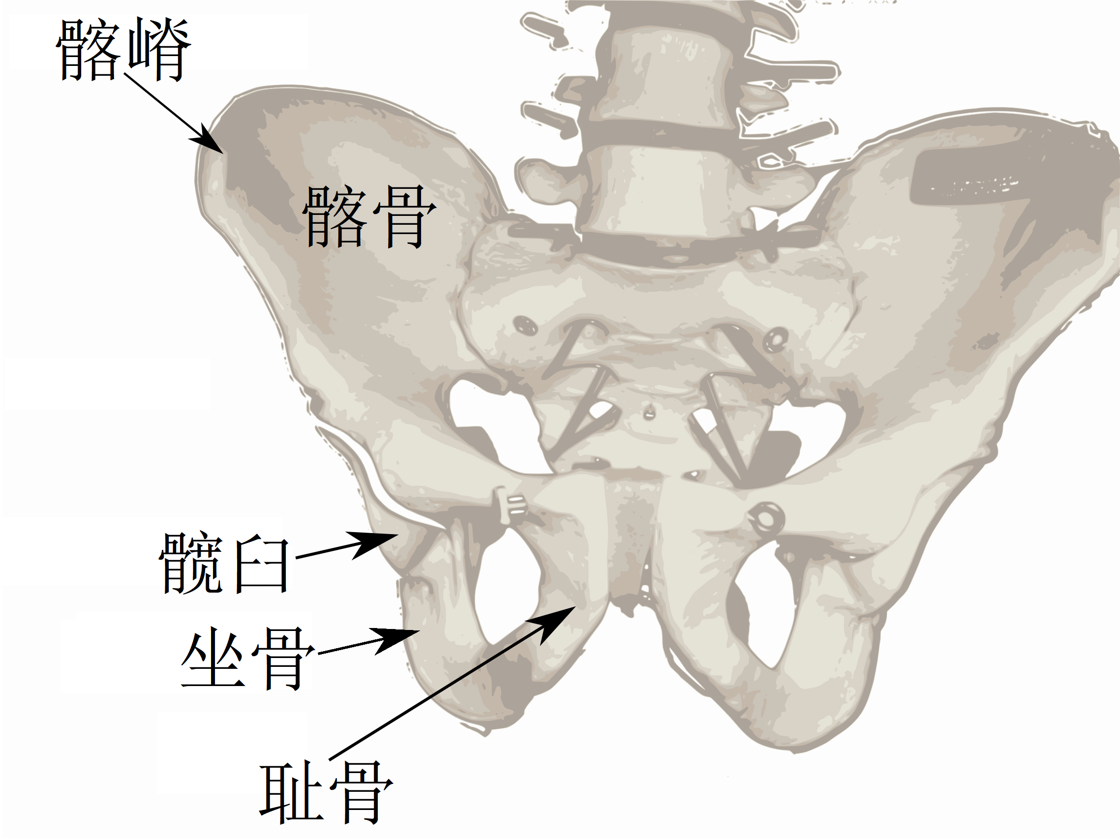 人体骨盆的标记图，原作者根据在大学解剖实验室拍摄的模型照片创建。使用Inkscape 0.44.1进行跟踪和渲染